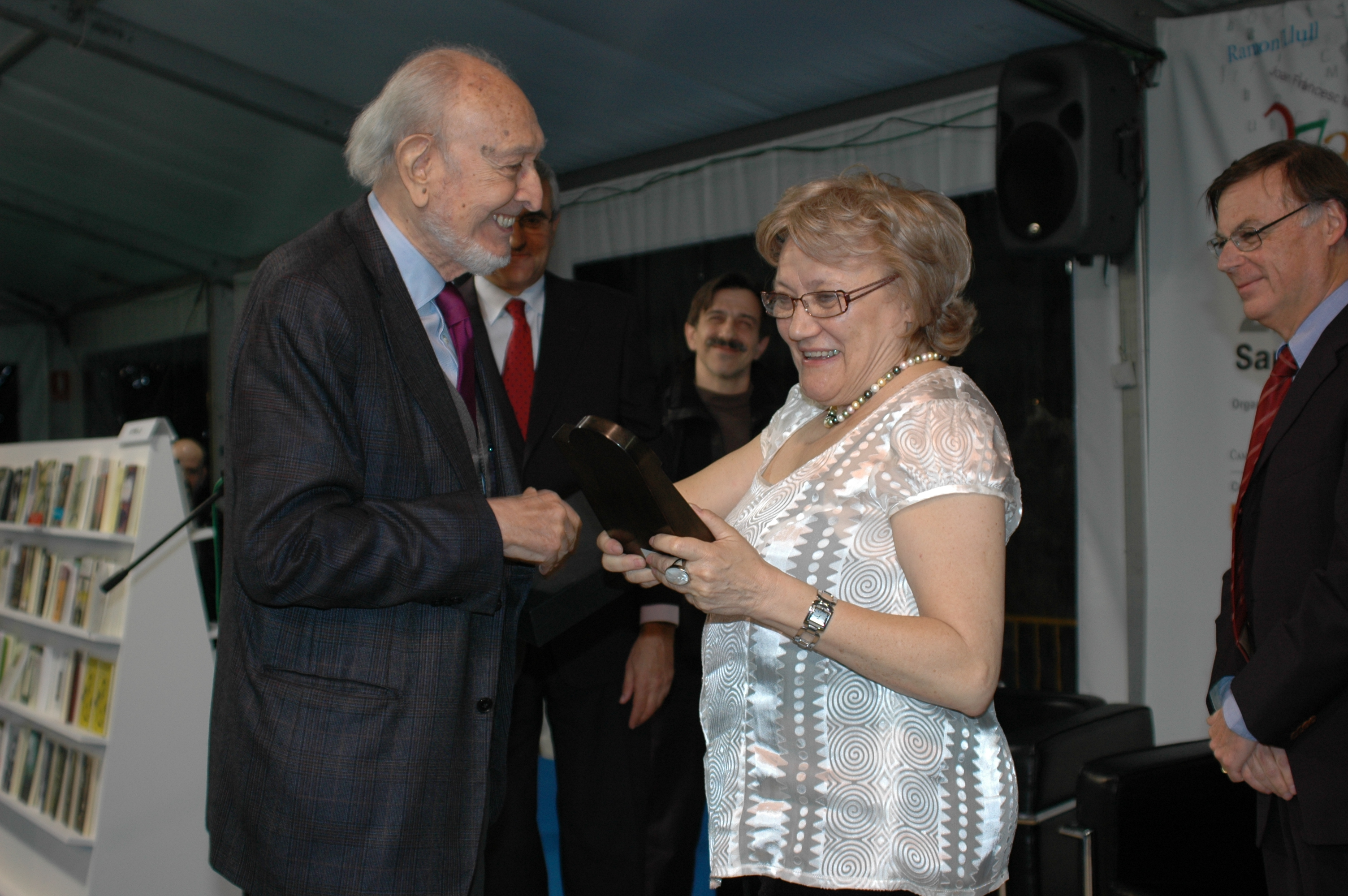 Isabel-Clara Simó rep el tretzè premi Trajectòria